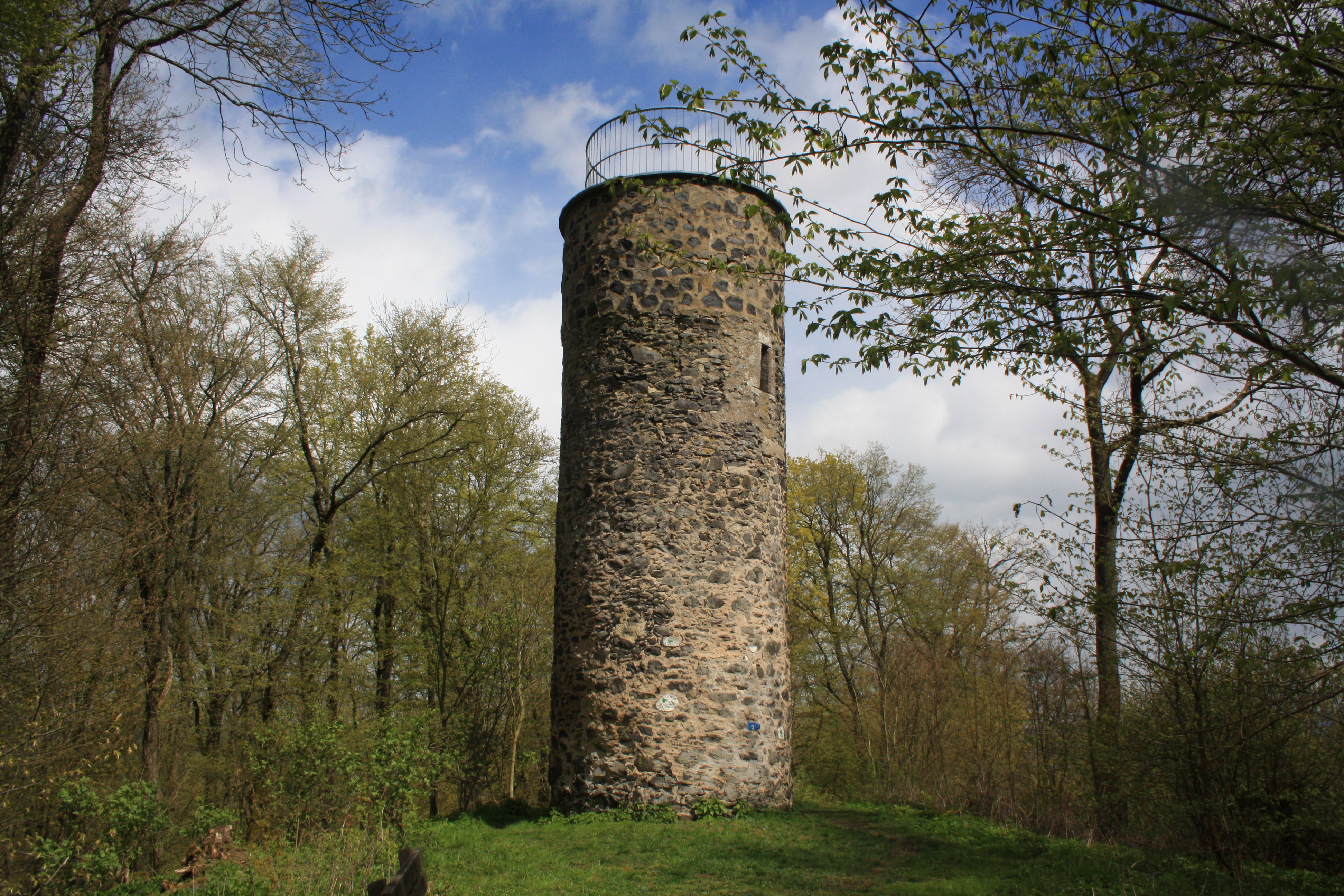 Petersberger Warte auf dem Rauschenberg im April 2016